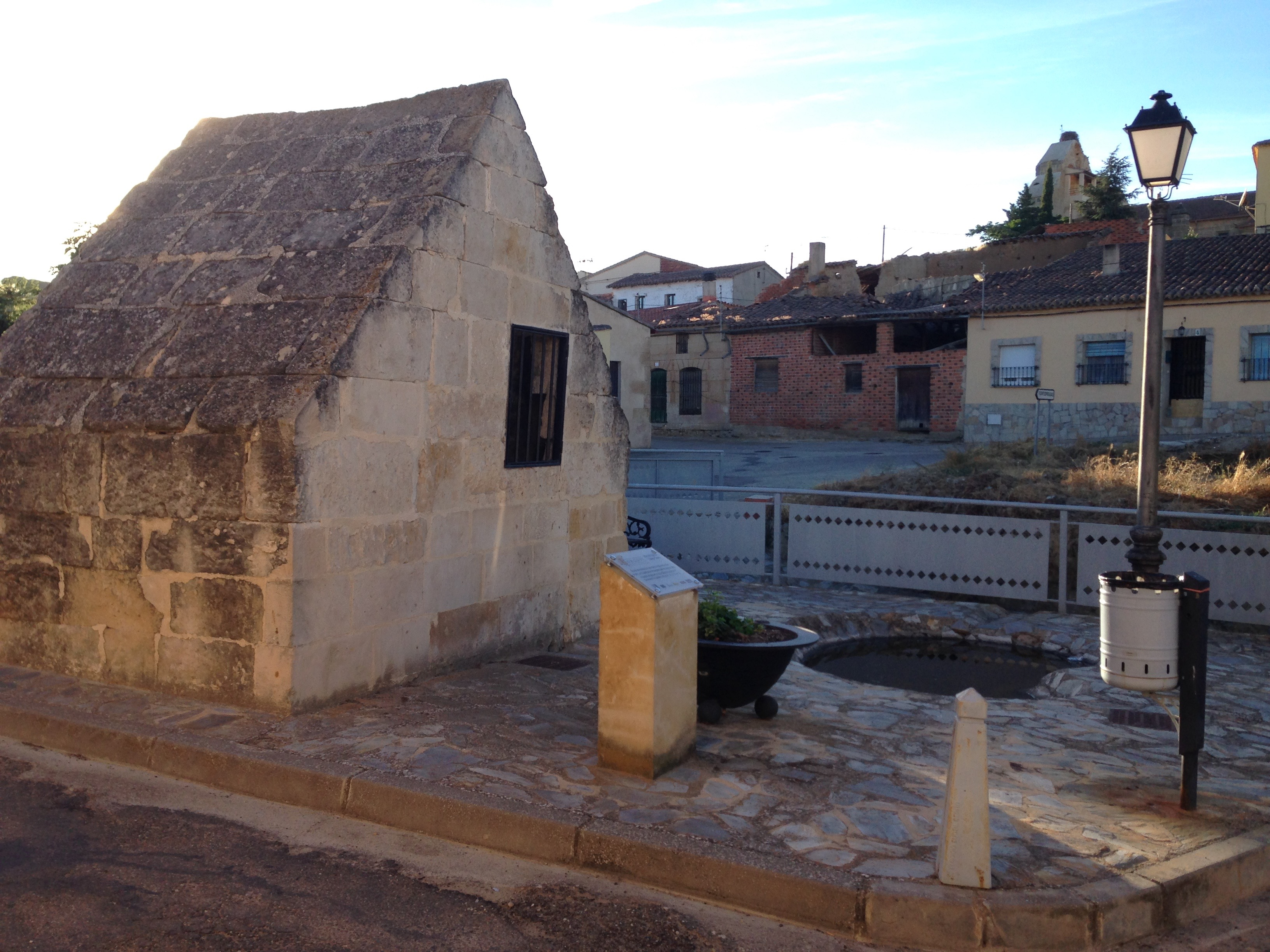 Santa Clara de Avedillo. Fuente de posible origen romano recientemente restaurada.